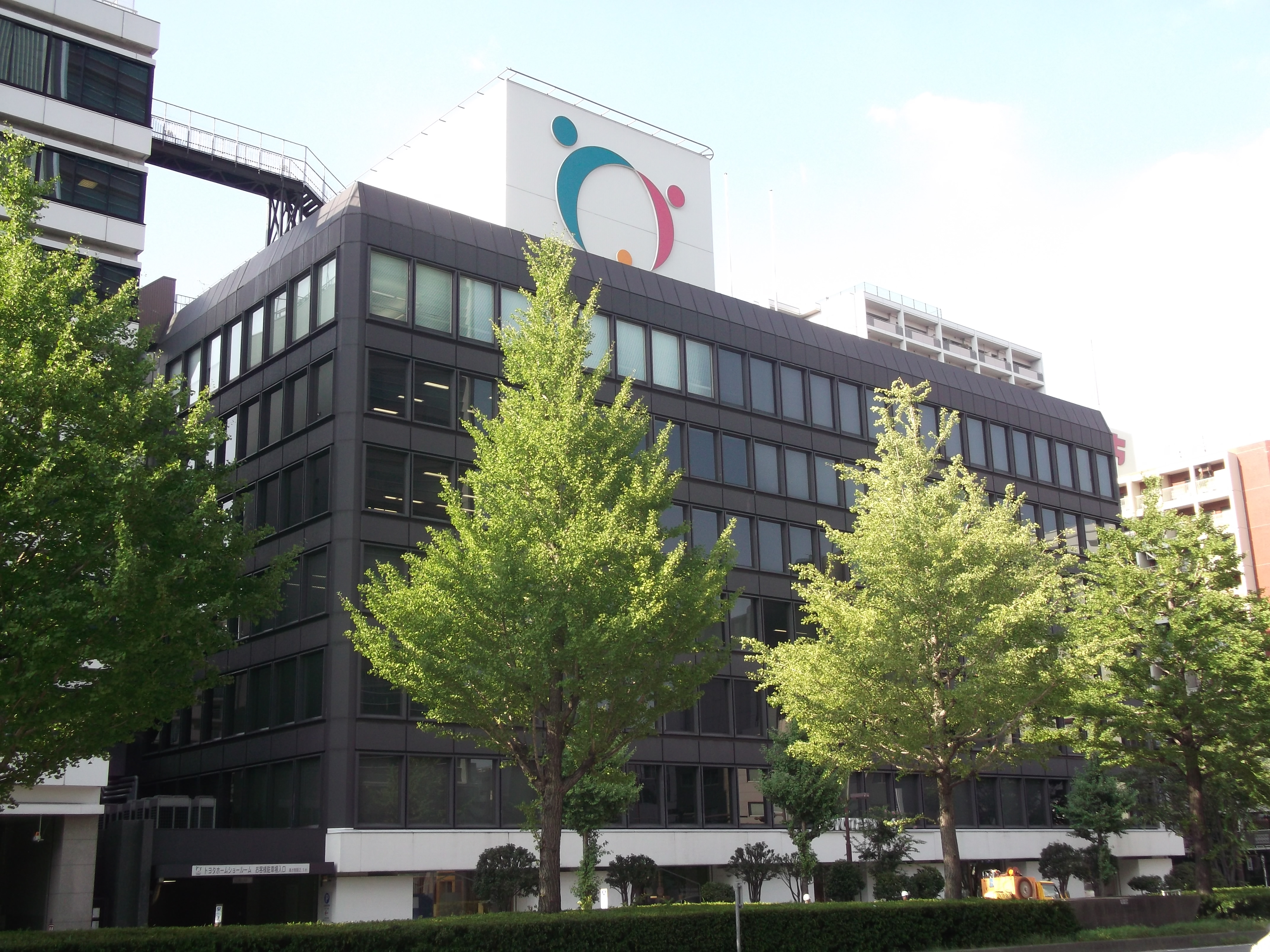 名古屋市東区のトヨタホーム本社を南側公道西側より撮影